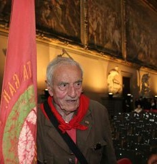 24 giugno 2015, nel Salone del '500 di Palazzo Vecchio Silvano Sarti riceve per conto di ANPI Firenze il Fiorino d'Oro, la massima onorificenza cittadina